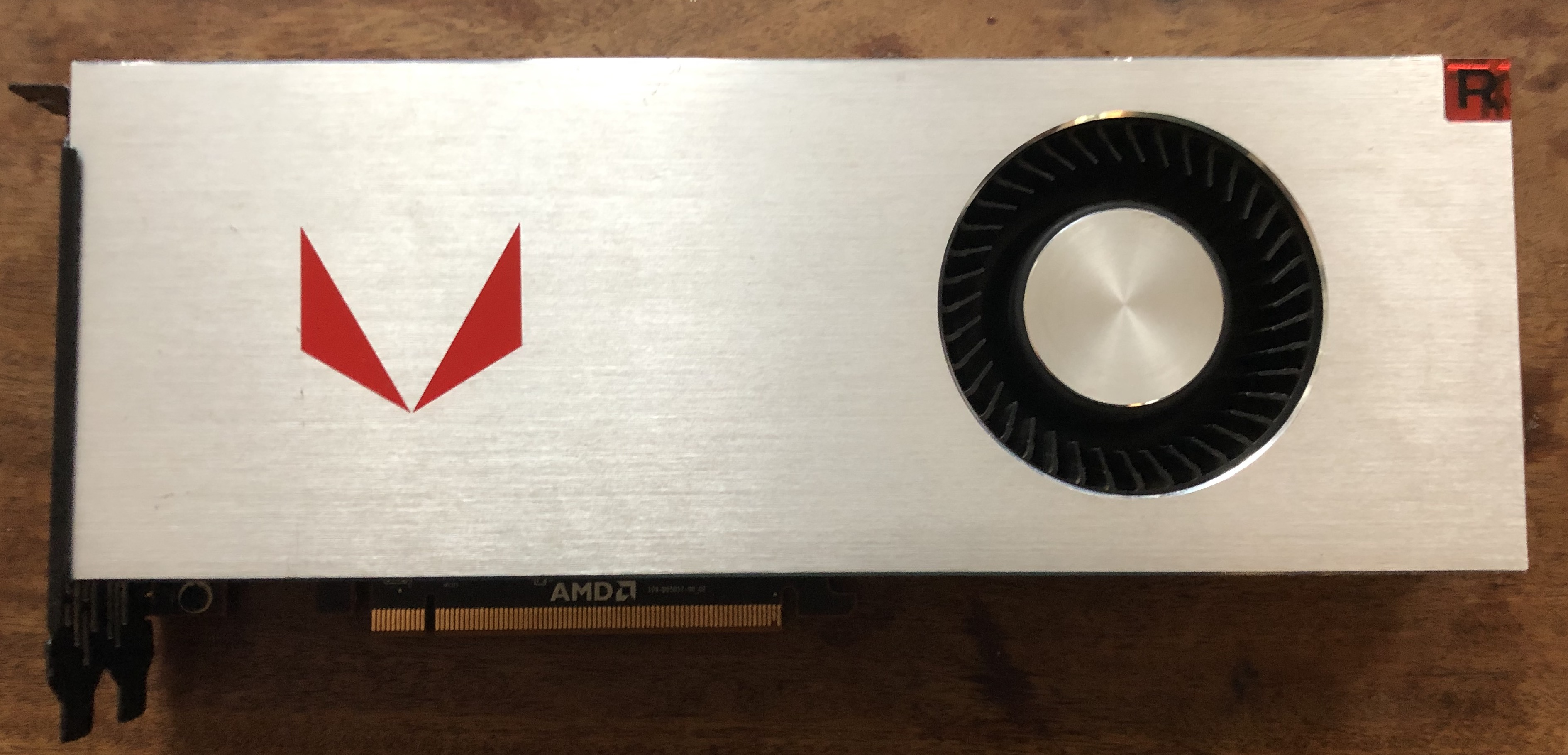 Vega 64 AMD Referenzdesign